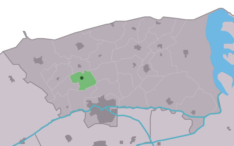 Kaartsje fan himrik fan De_Lytse_Jouwer